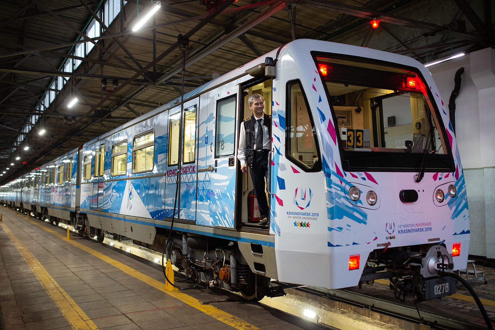 Именной электропоезд метро «Универсиада-2019» типа 81-740/741 в депо